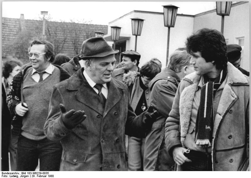 Berlstedt, Besuch von Kulturschaffenden ADN-ZB Ludwig-29.2.80 Bez. Erfurt: Die 3. Berlstedter Gespräche nutzten Kulturschaffende dazu, sich mit dem Leben im Gemeindeverband vertraut zu machen. Hier ein Gespräch mit Klaus-Dieter Henkler und dem Bürgermeister von Berlstedt Alfred Büchler (M.).